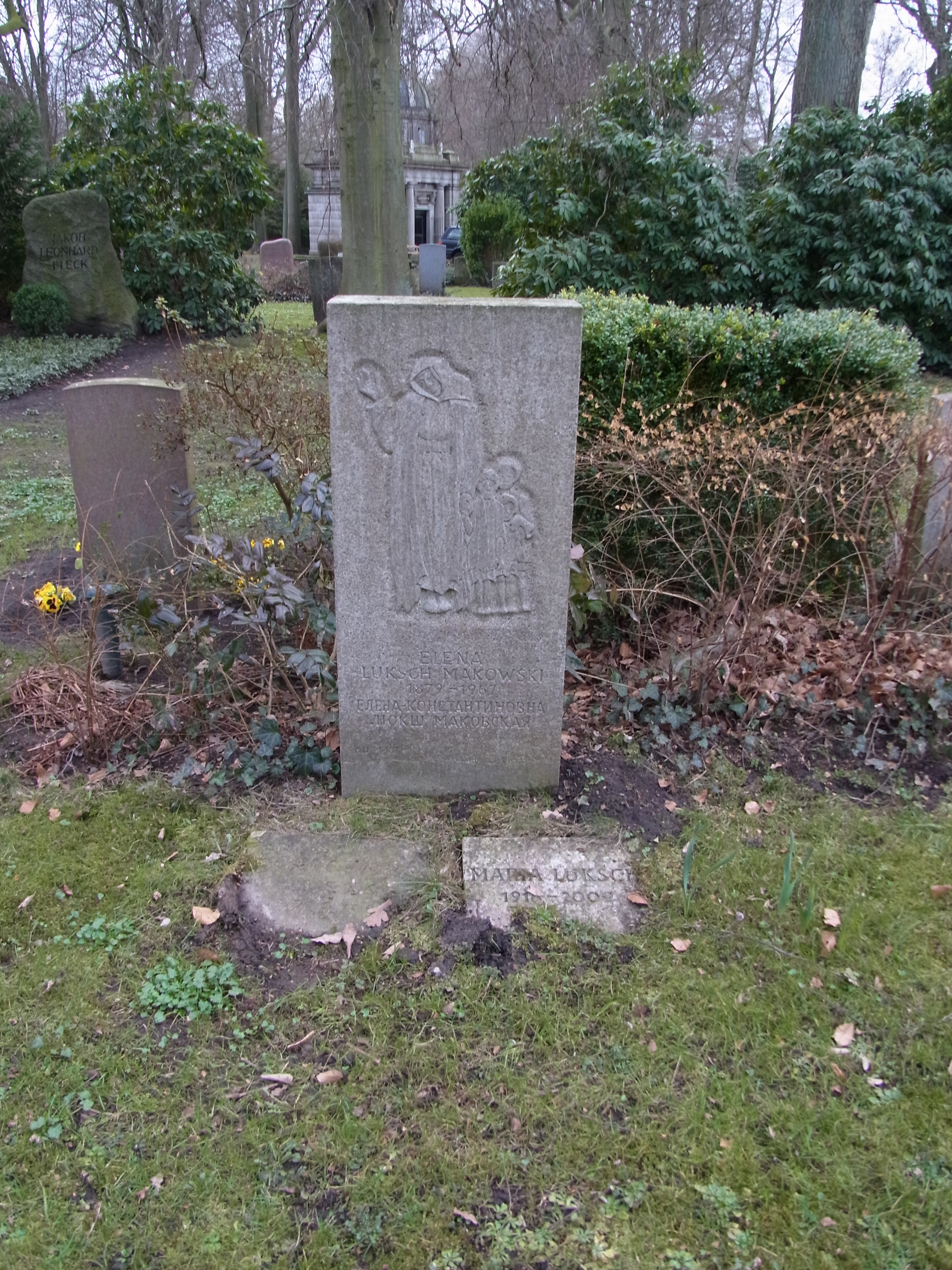 Grabstein für Elena Luksch-Makowsky (2013)